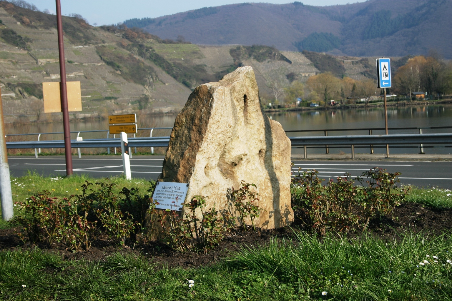 Ankersteen zu Mehring.